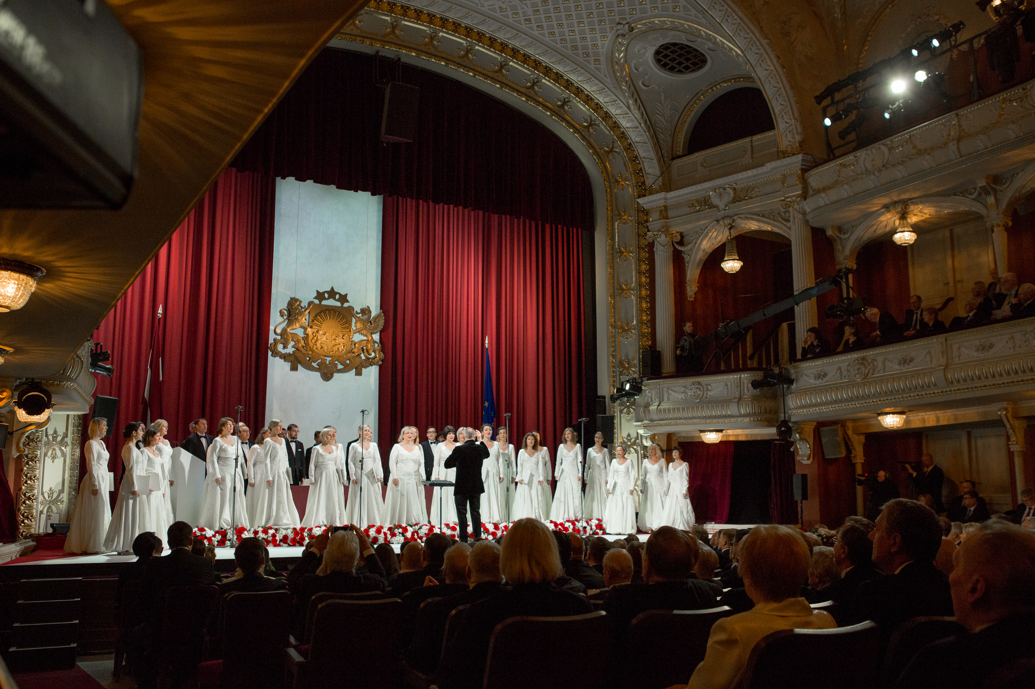 2018.gada 18.novembris. Saeimas svinīgā sēde par godu Latvijas Republikas proklamēšanas simtajai gadadienai. Sēde notiek Latvijas Nacionālajā teātrī - namā, kurā dibināta mūsu valsts. Foto: Ernests Dinka, Saeima Izmantošanas noteikumi: saeima.lv/lv/autortiesibas